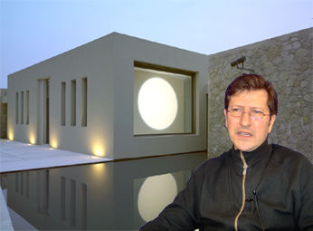 Portrait de Michel Verjux